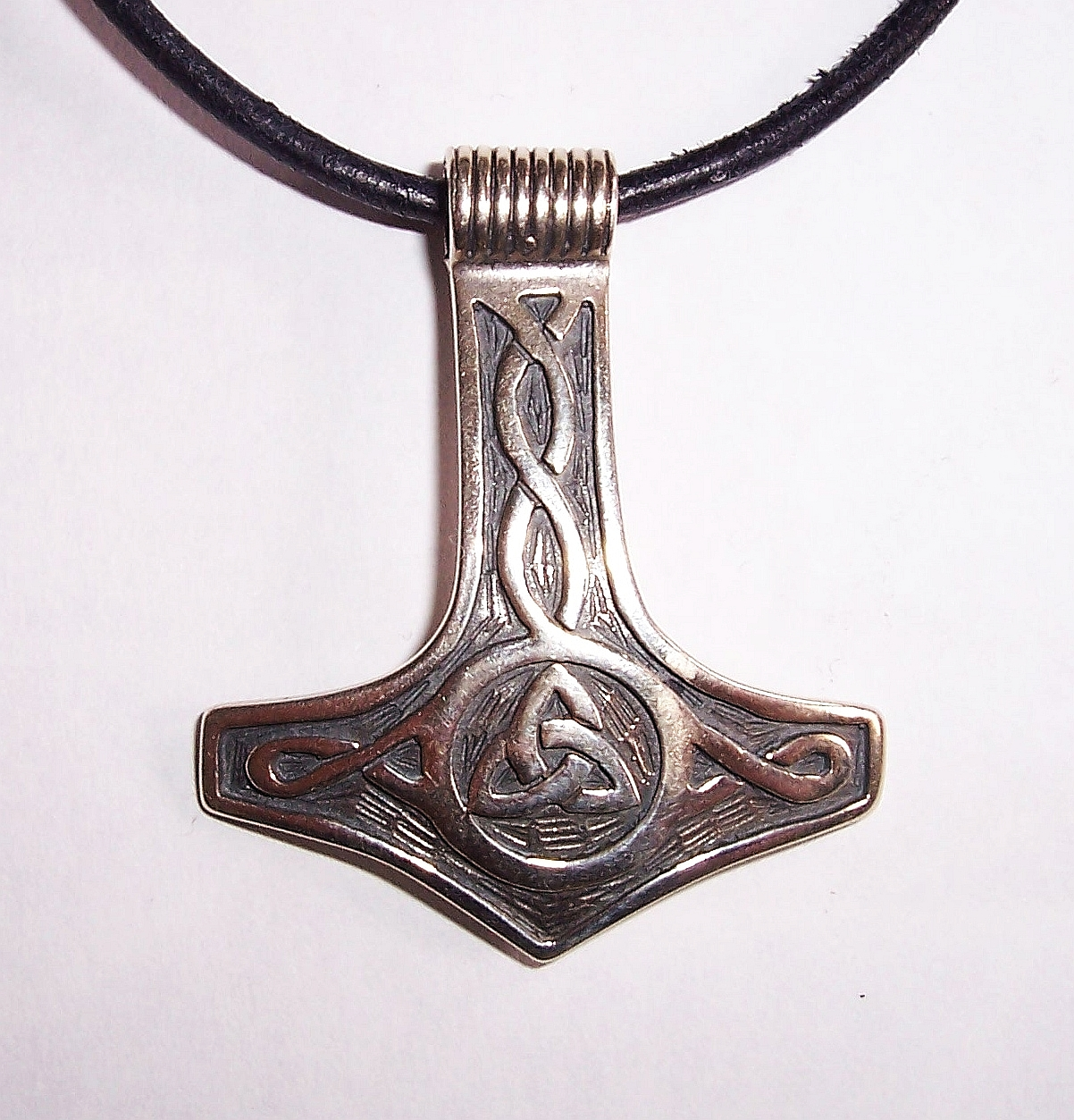 Modern Mjolnir, Thorshammer